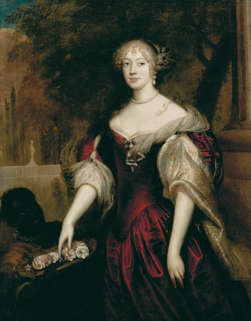 Portret van Anna van Ewsum, vrouwe van Nienoord, door Jan de Baen. Mogelijk ter gelegenheid van haar (tweede) huwelijk in 1665.